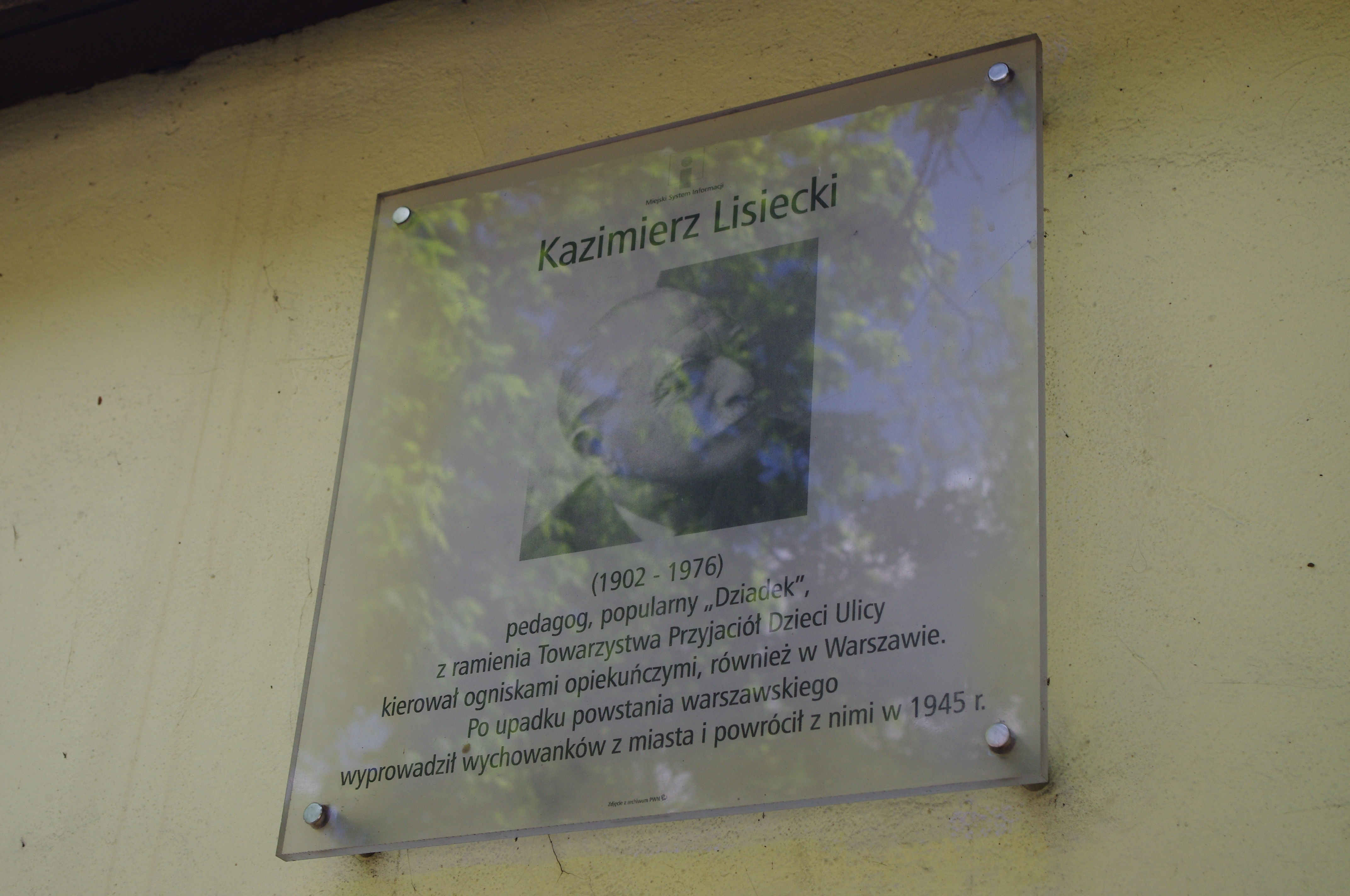 Tablica Miejskiego Systemu Informacji upamiętniająca Kazimierza Lisieckiego w Parku Praskim im. Żołnierzy 1 Armii Wojska Polskiego w Warszawie